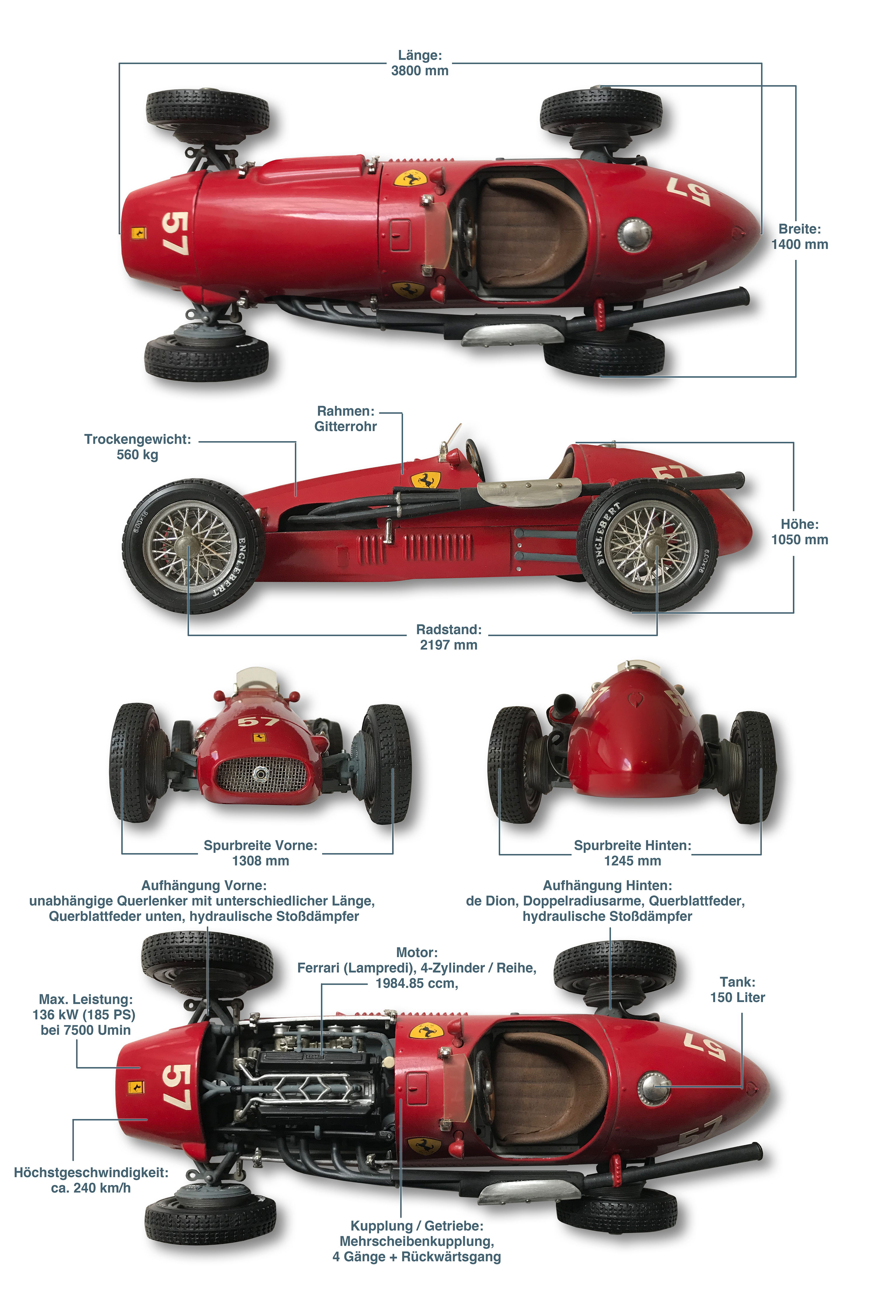 Grafisch aufbereitete Basis-Informationen zum Ferrari 500 F2